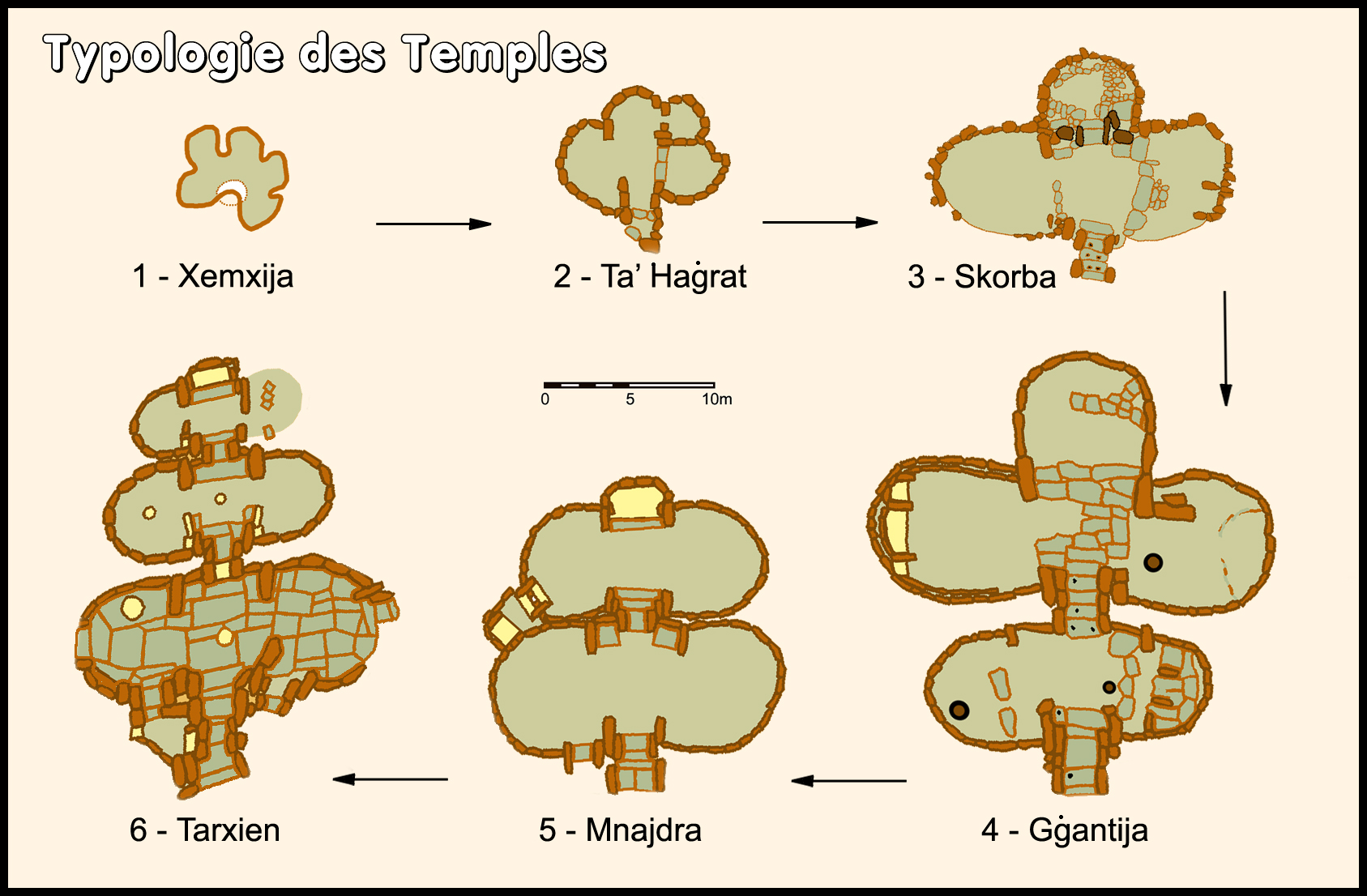 typologie des temples maltais